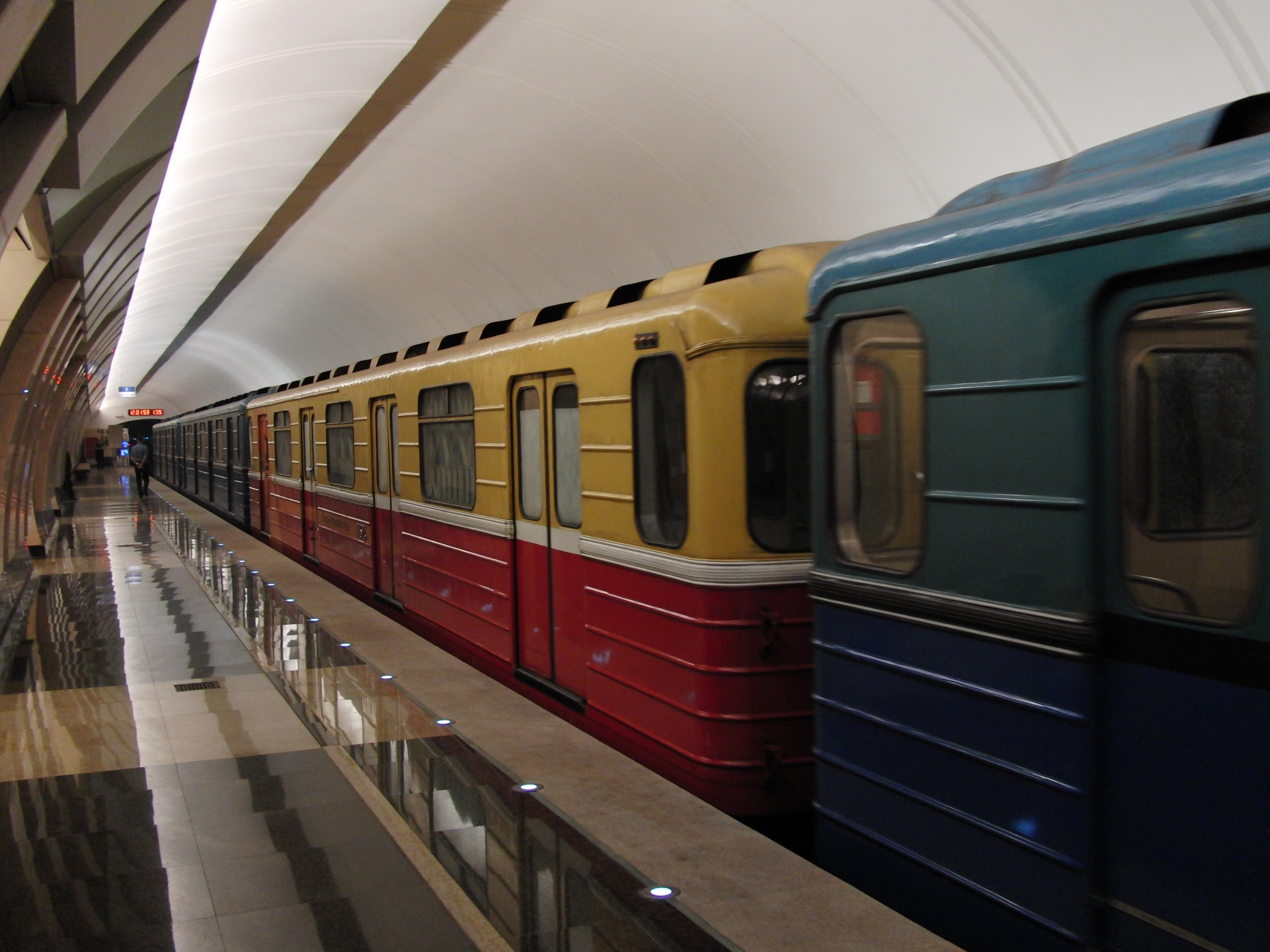 Track geometry train at Maryina Roshcha station (Путеизмеритель на станции Марьина Роща)